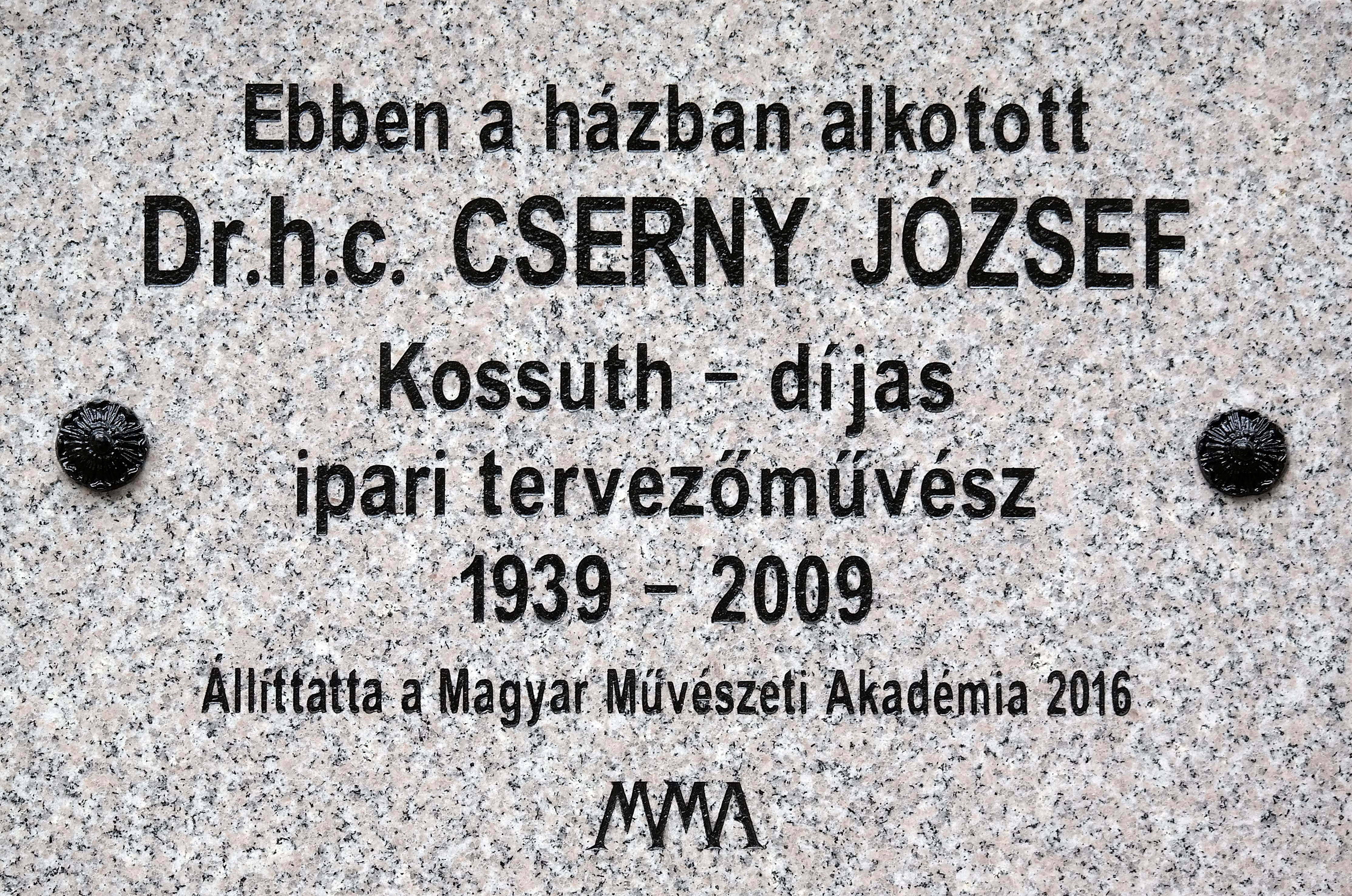 Cserny József ipari tervezőművész emléktáblája (Budapest XII. kerület Maros utca 10)